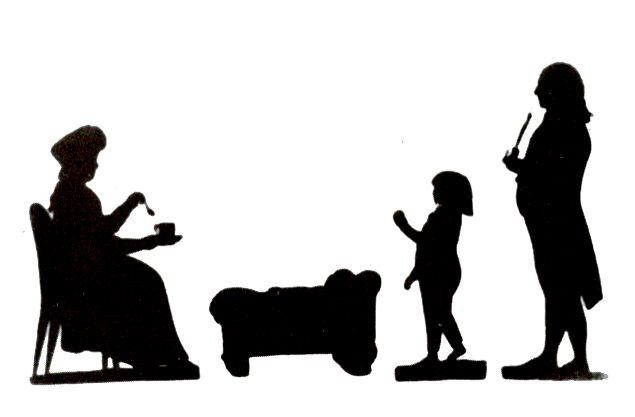 Mads Lind Nissen (1756–1827) med familie